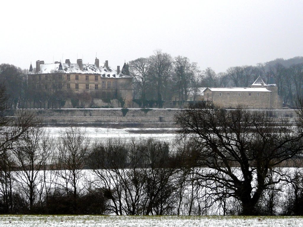 Château d'Hombourg-Budange, Lorraine, France. Château renaissance et classique construit sur une enceinte médiévale.